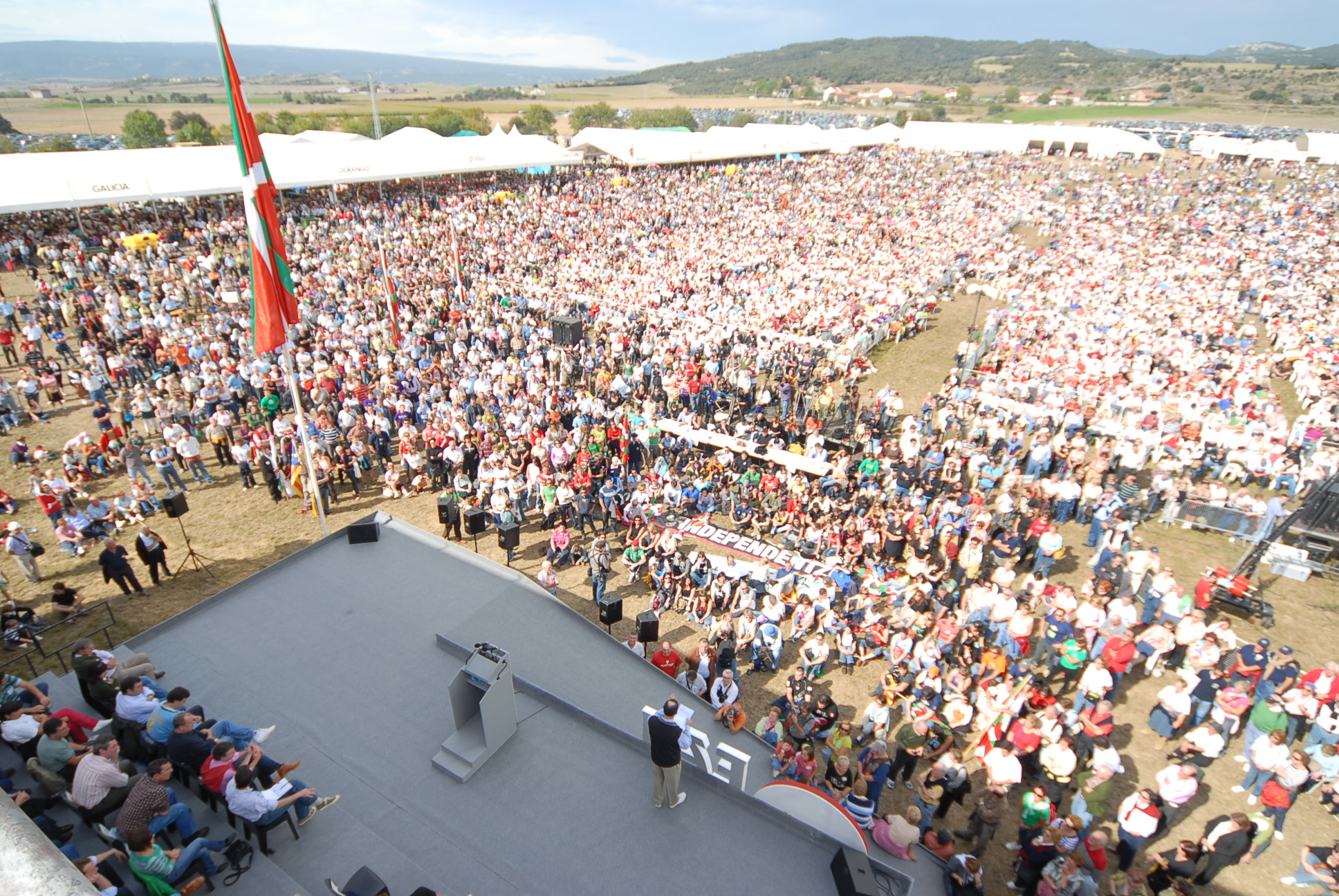 Discurso del lehendakari Ibarretxe durante el "Alderdi Eguna" (Día del Partido Nacionalista Vasco) del 2007.